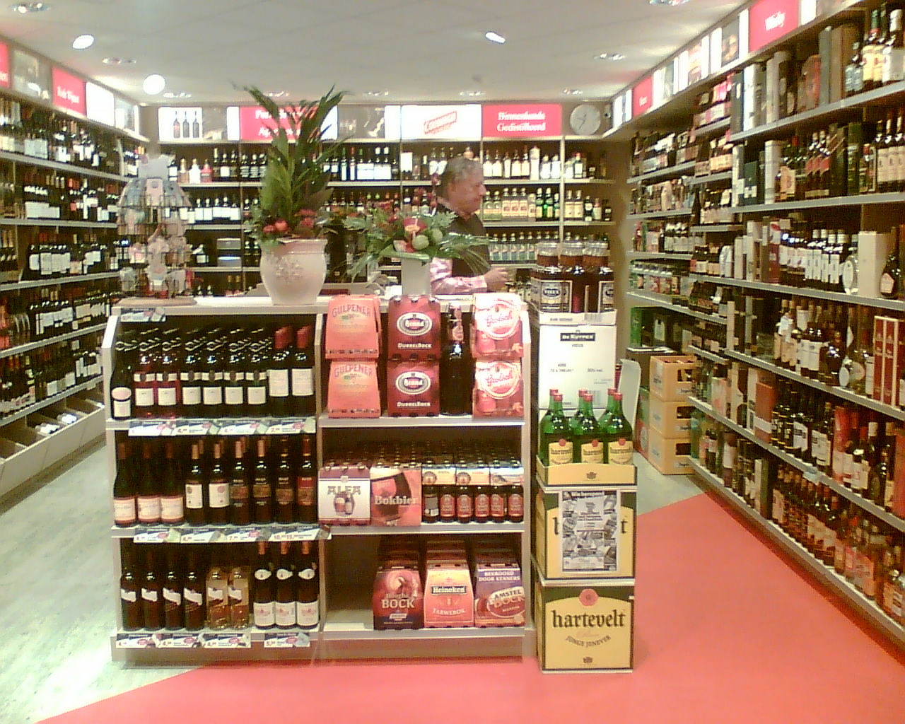 Slijterij en Wijnhandel Pinot